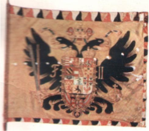 Flag